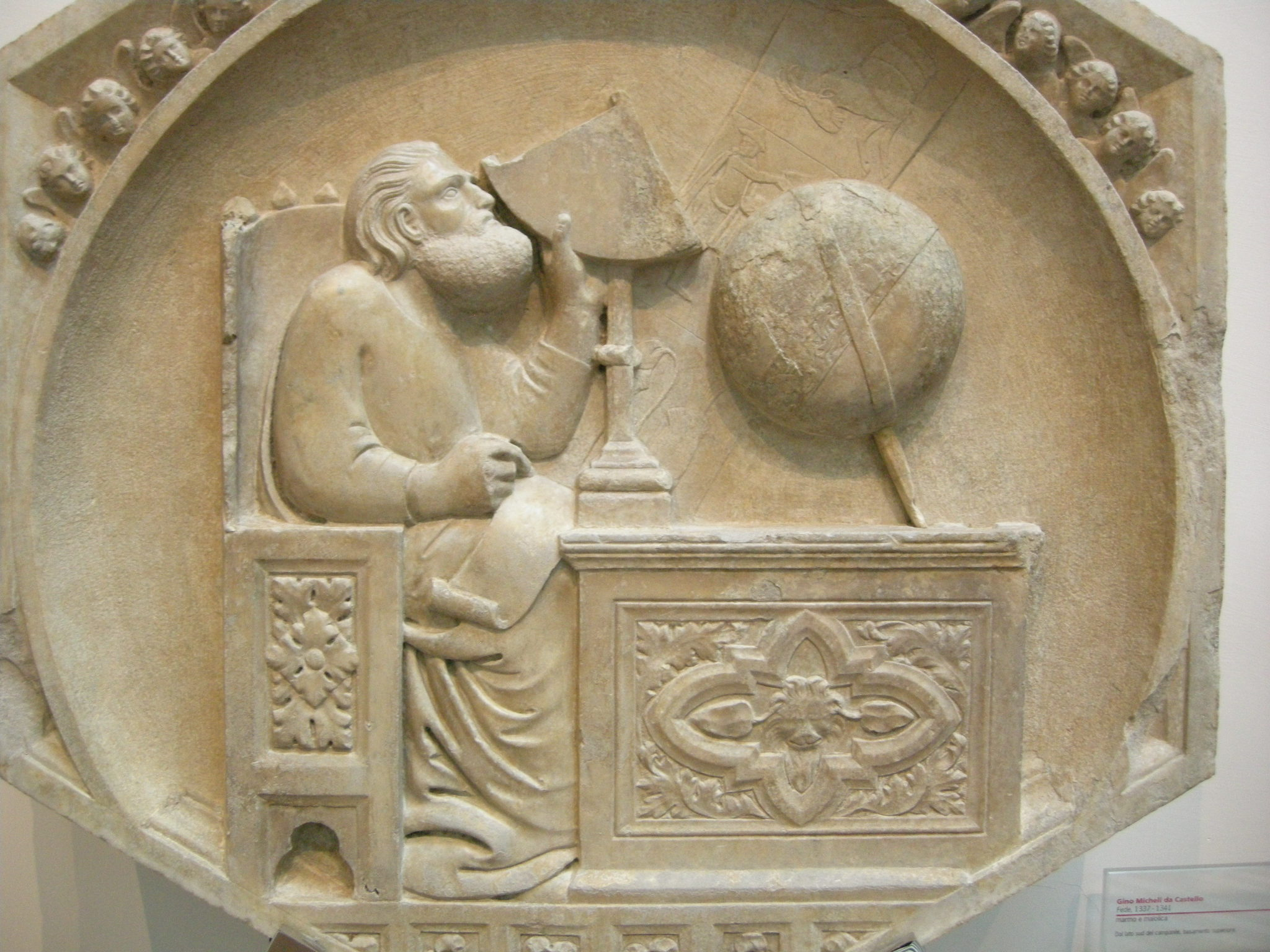 Formella 08, gionitus inventore dell'astronomia, collaboratore di andrea pisano (maestro dell'armatura), 1334-1336